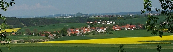 Blick auf Wethen (Ortsteil von Diemelstadt)